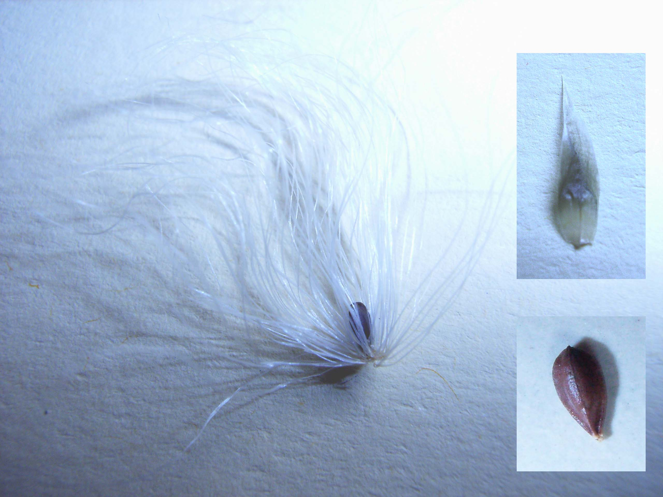 Frucht des Scheiden-Wollgrases (Eriophorum vaginatum) mit Hüllfäden, rechts unten Karyopse, rechts oben Spelze